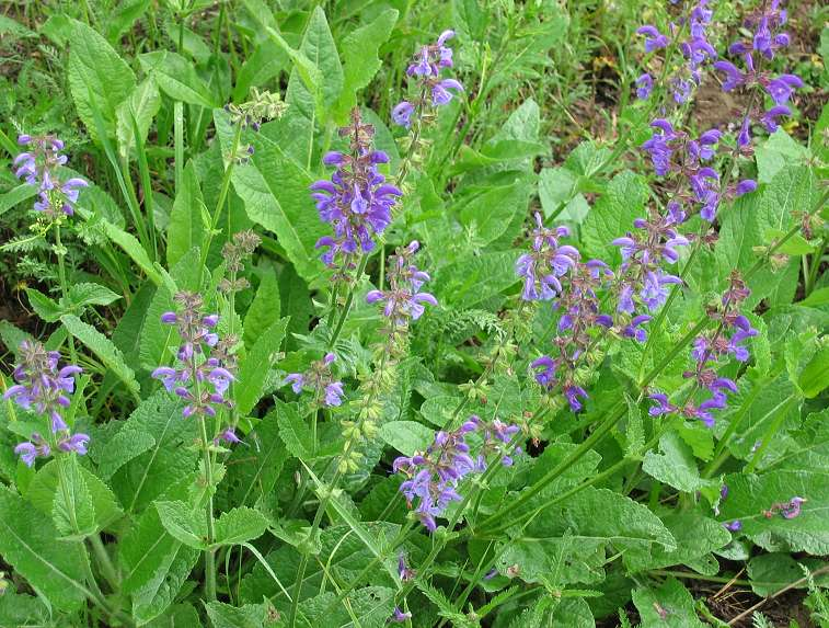 Wiesensalbei (Salvia pratensis)